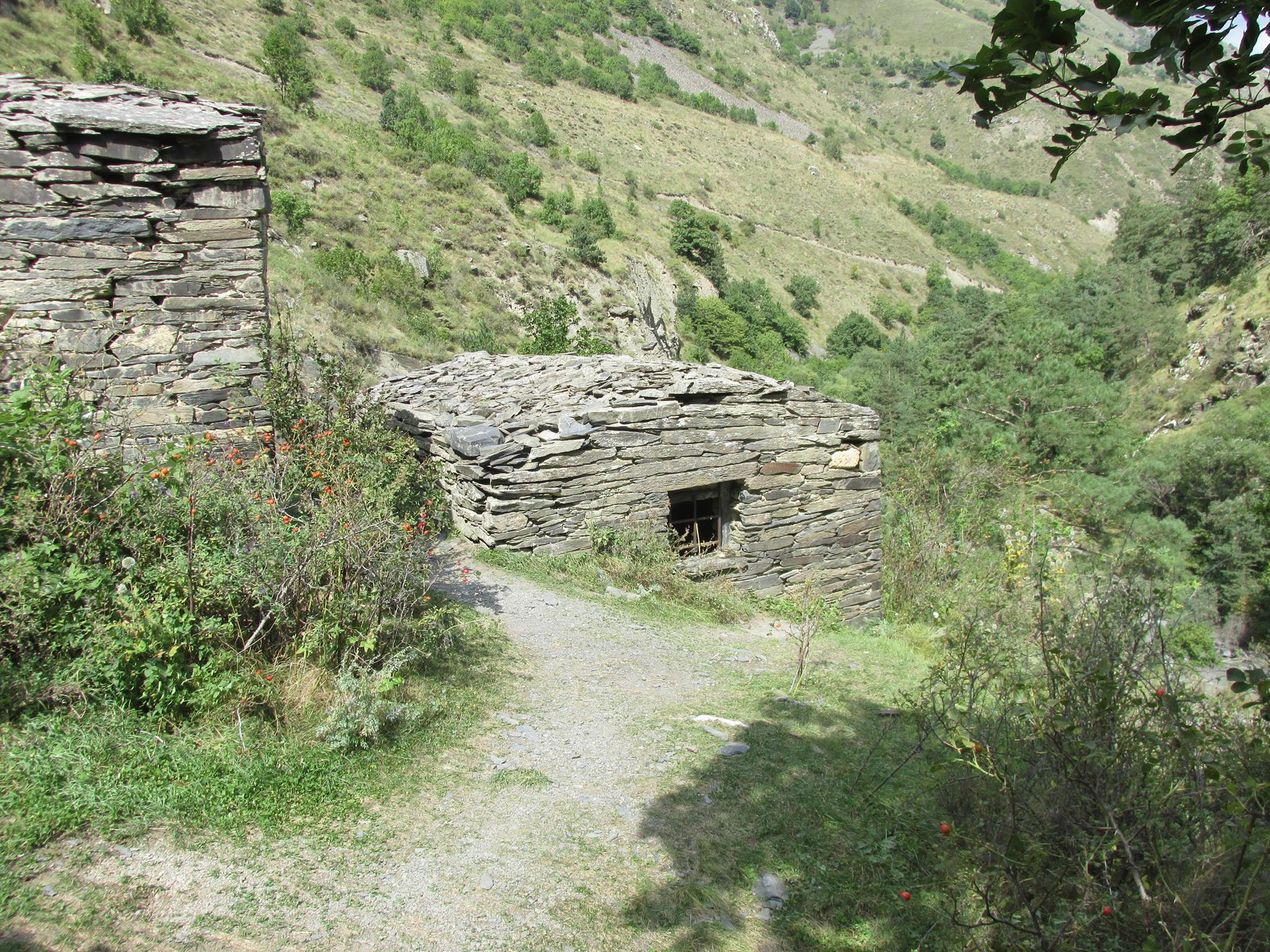 ანატორის აკლდამები